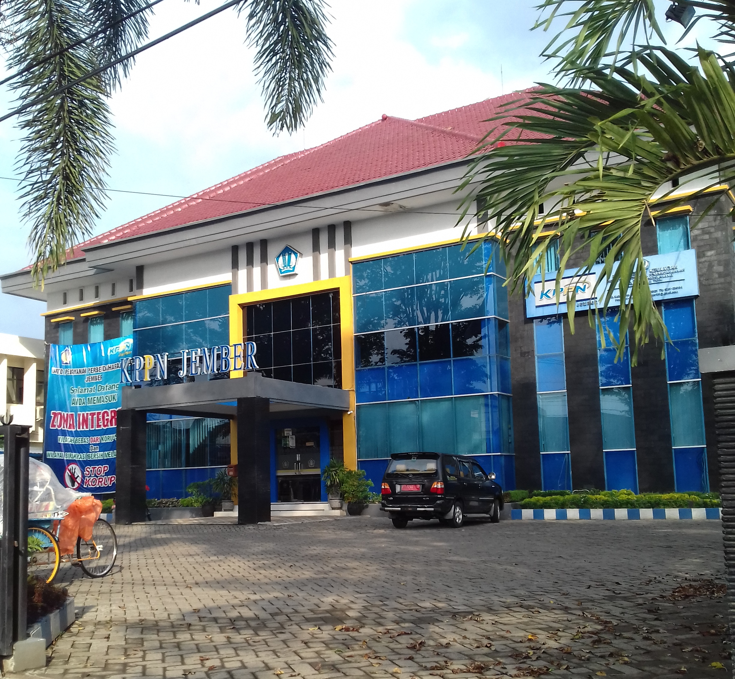 Tampak depan KPPN Jember